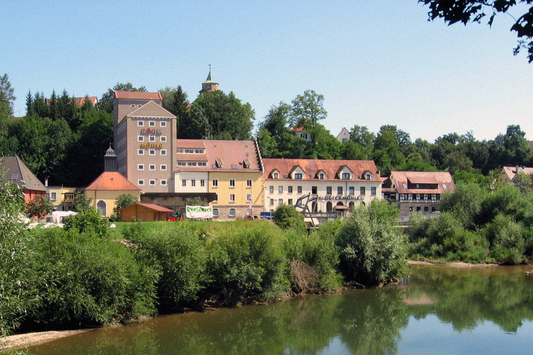 Mühle am Neckar in Reutlingen-Mittelstadt